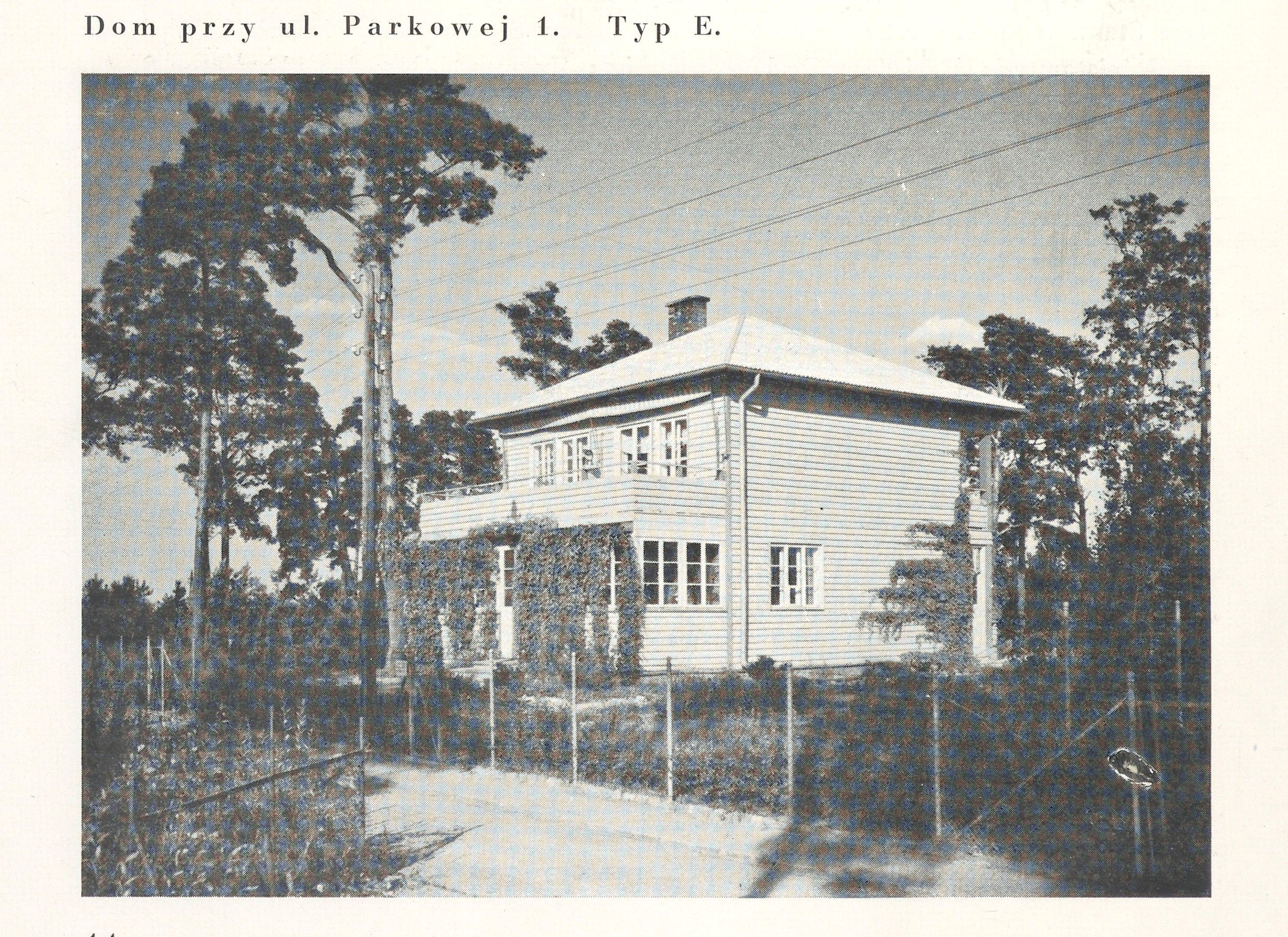 Drewniany dom modułowy (typ B) na osiedlu Boernerowo, zaprojektowany w 1932 roku przez architektkę Wandę Boerner-Przewłocką